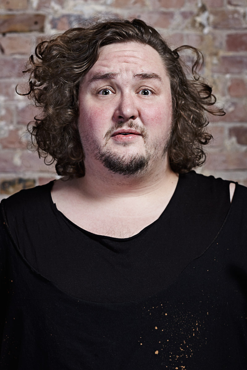 Bild des Schauspielers Daniel Zillmann.